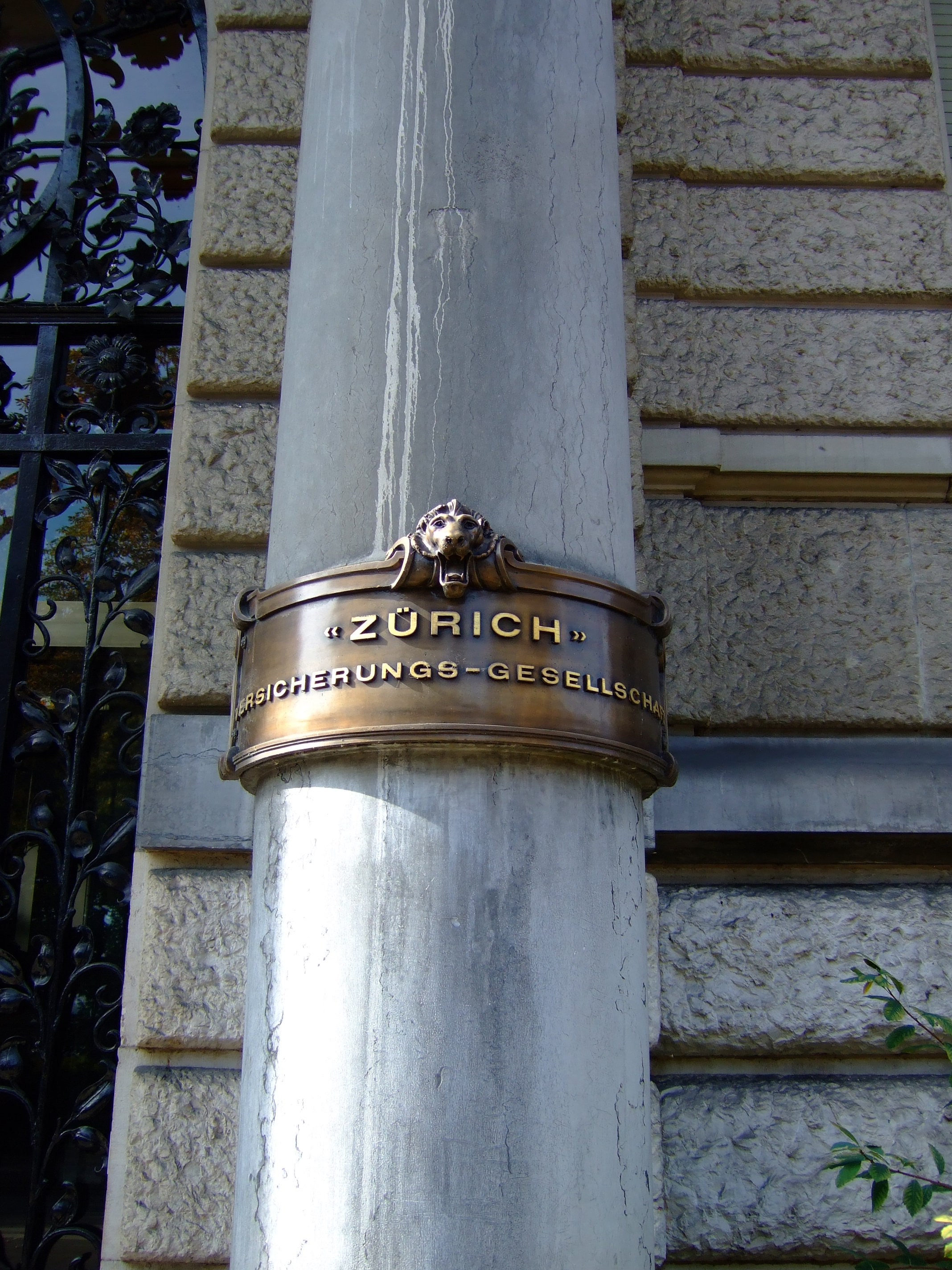 Schriftzug der «Zürich Versicherungs-Gesellschaft (heute nur noch verwendet für das Schweizer Geschäft) am Hauptsitz in Zürich des heute als Zurich Financial Services firmierenden Konzerns.